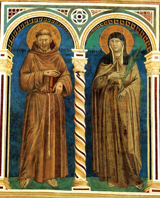 Franziskus und Klara, Fresko, 1279 - 1300, in der Oberen Basilika San Francesco in Assis.